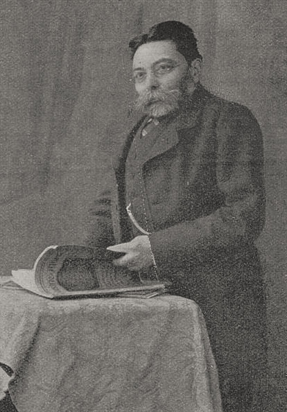 Dr. Eduard Hüsgen ist am 20. Oktober im Alter von 64 Jahren gestorben. Er war Vorsitzender der Zentrumsfraktion des Düsseldorfer Stadtverordnetenkollegiums, dem er seit 1899 angehörte, ferner Schriftführer des Verbandes der rheinisch-westfälischen Presse, Vorstandsmitglied des Vereins für katholische Arbeiterkolonien usw. Als Redakteur wie als Schriftsteller hat er sich einen geachteten Namen erworben.